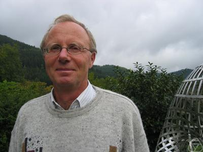 Foto di Victor Bangert